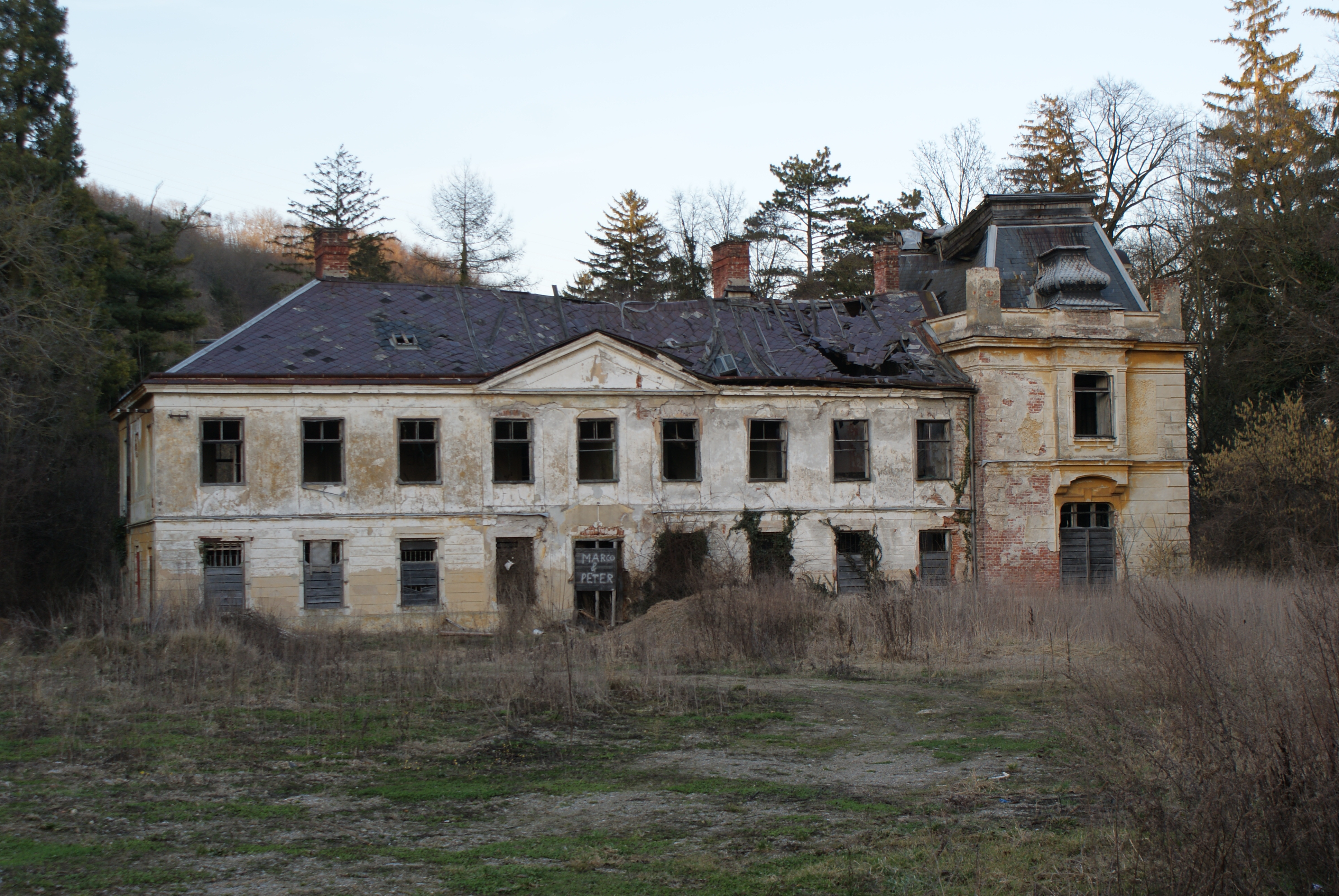 Das erste Herrenhaus der Spitzen- und Bobinet- und Vorhänge-Fabrik F. Austin im März 2010